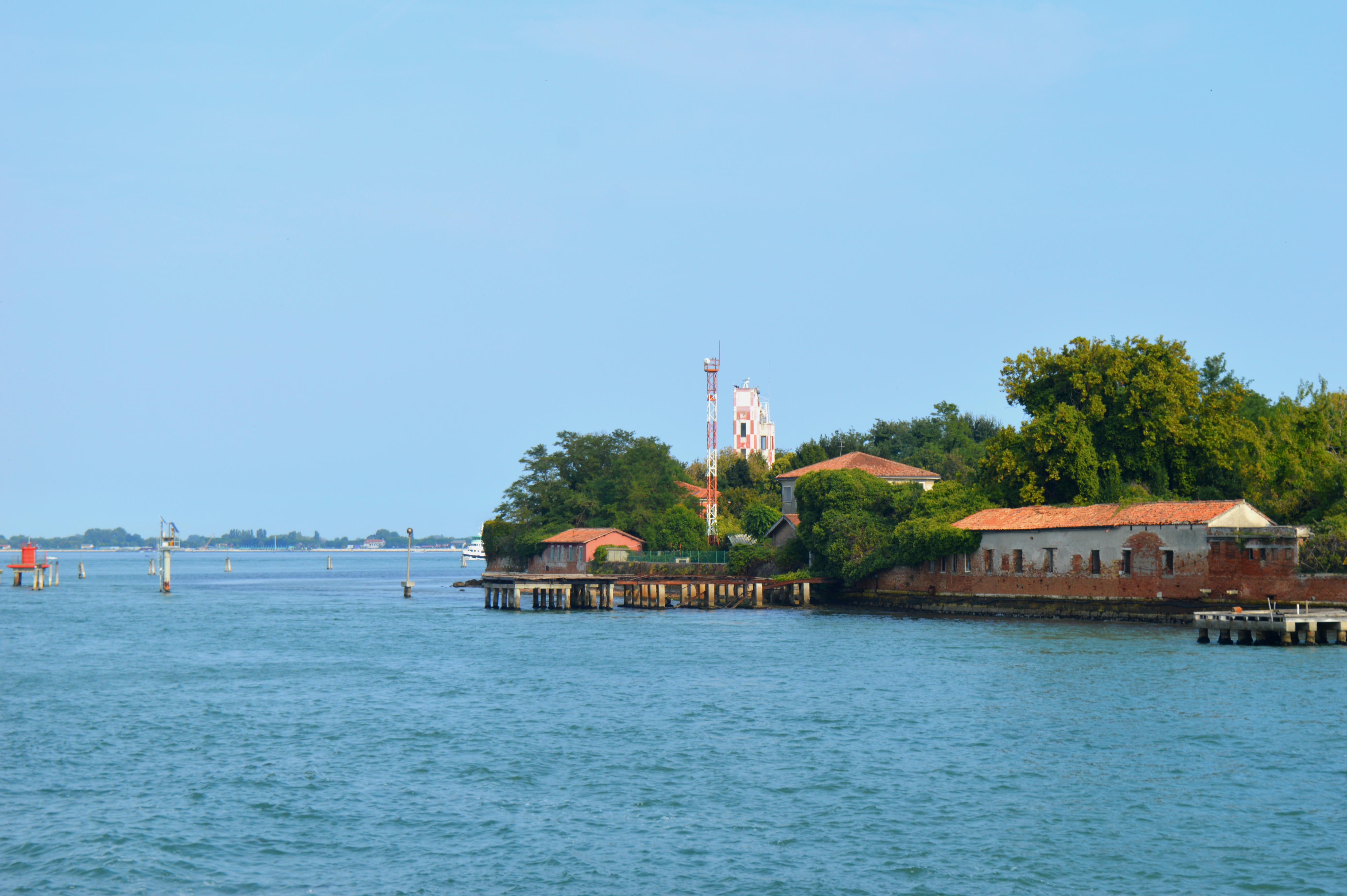 Venecija, more